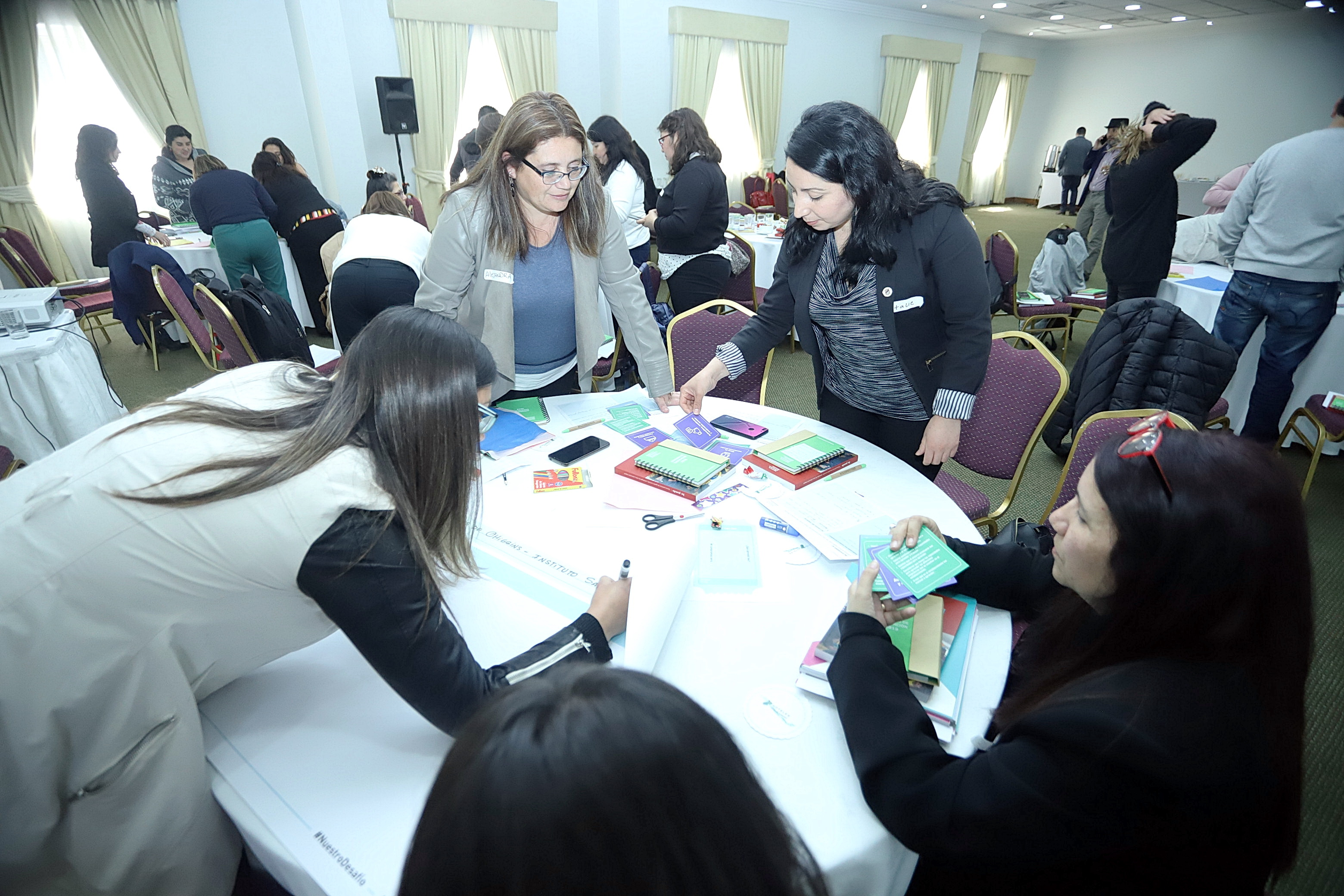 Jornada de orientación para padres y apoderados.